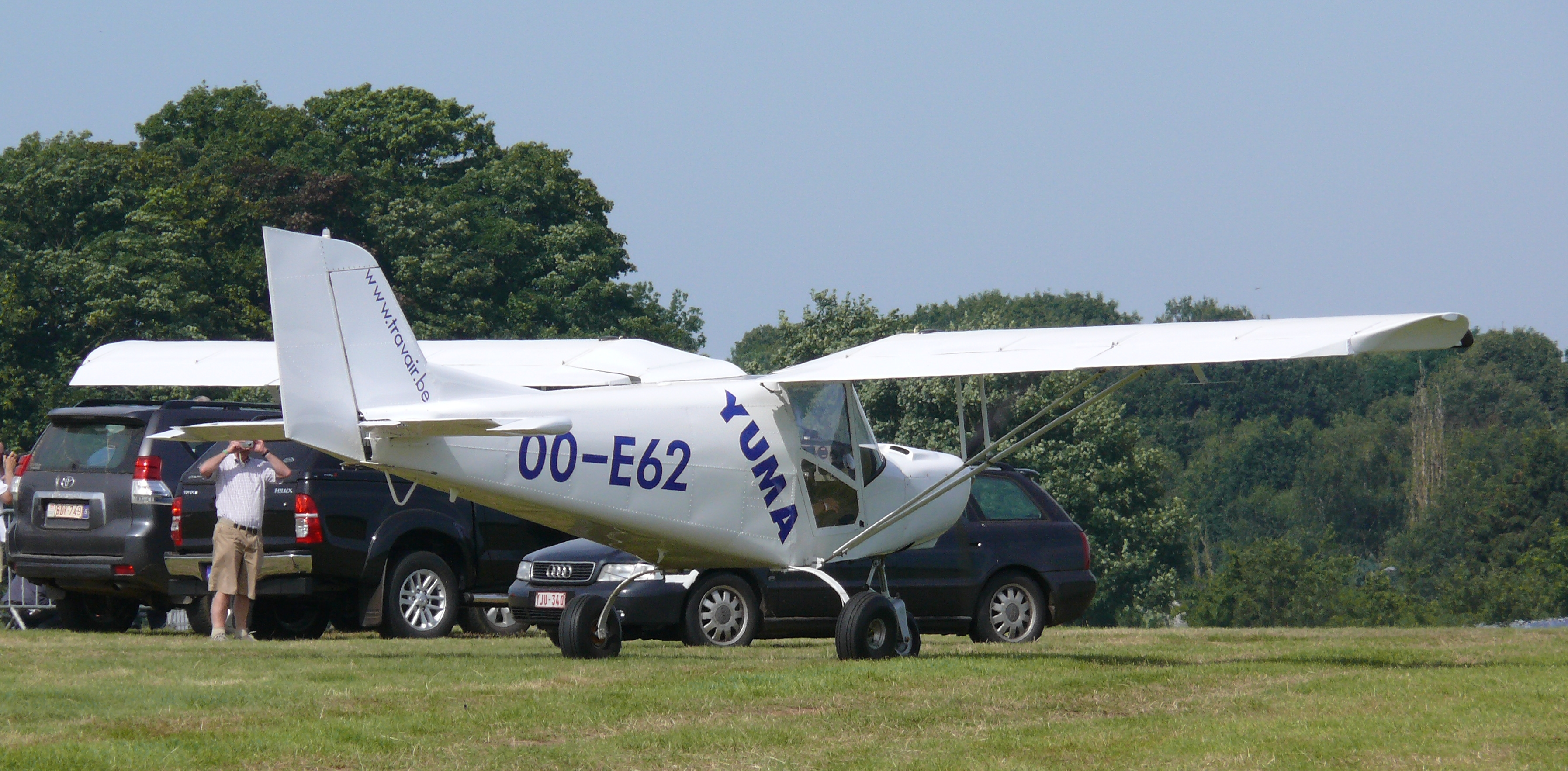 Alisport Yuma OO-E62 (c/n 1970540) op de Schaffen Fly and Drive In 2012.